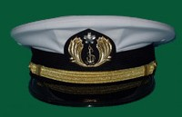 幹部候補生たる海曹長用正帽